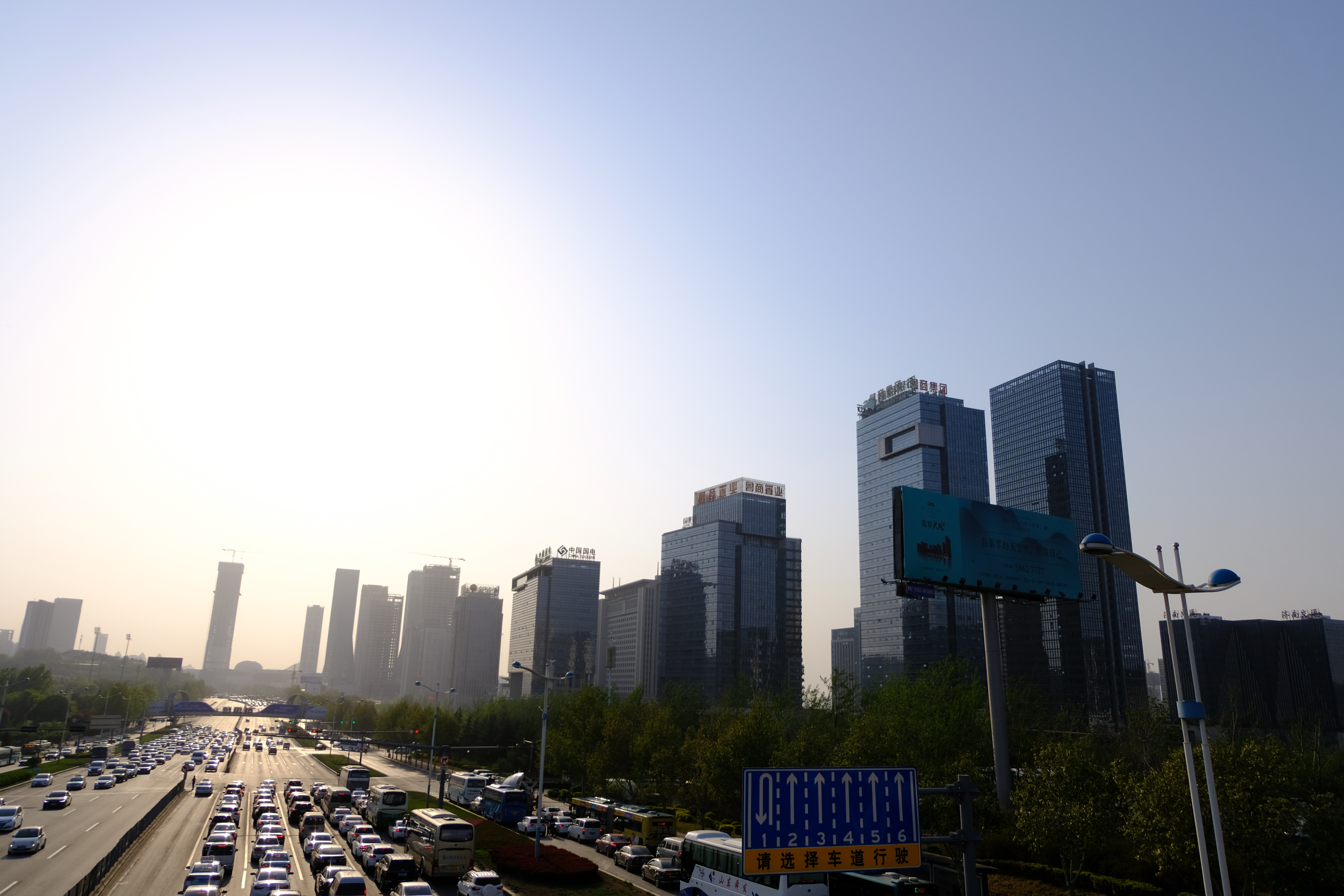 中文（中国大陆）: 济南奥体中心附近的摩天大楼